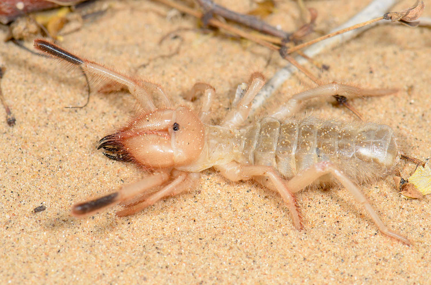 Palo Verde + creosote sand dune habitat